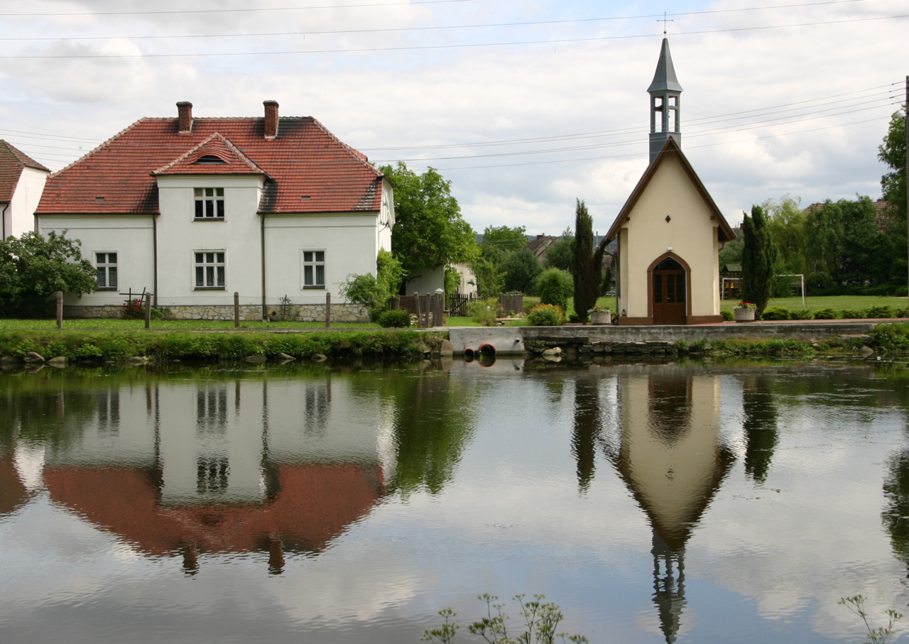 Zakrzów (dodatkowa nazwa w j. niem. Sakrau) – wieś w Polsce położona w województwie opolskim, w powiecie krapkowickim, w gminie Gogolin.